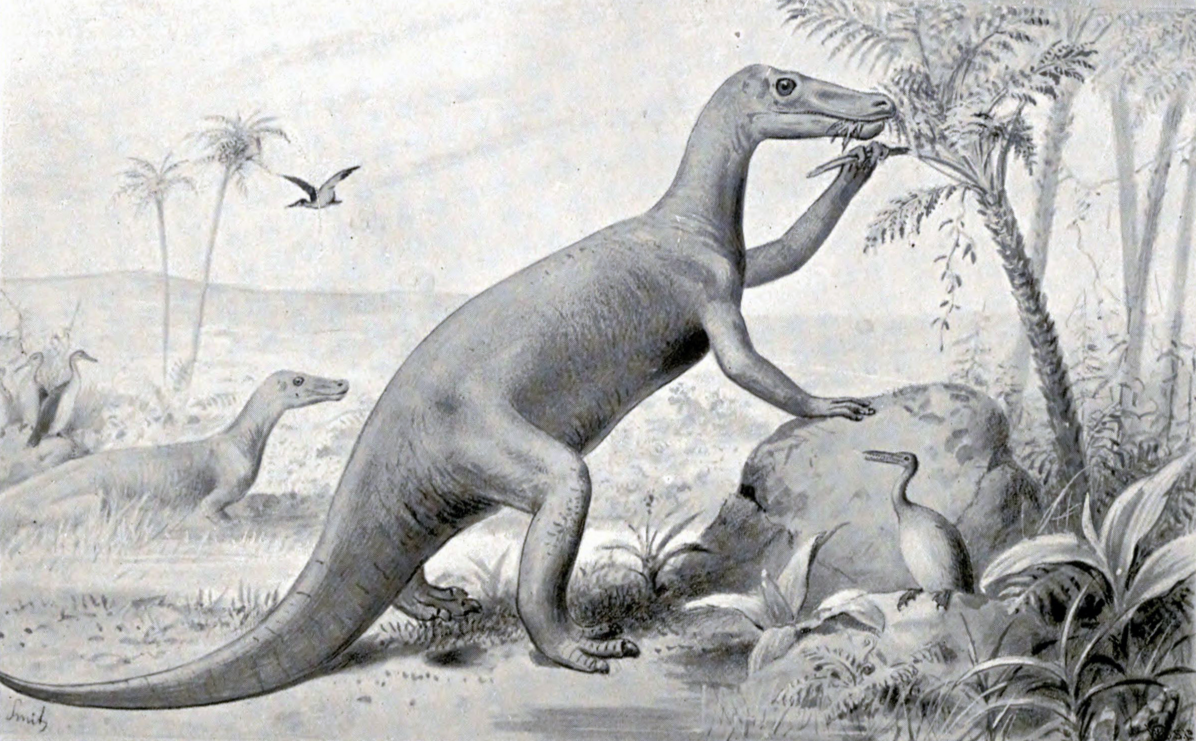 Claosaurus.